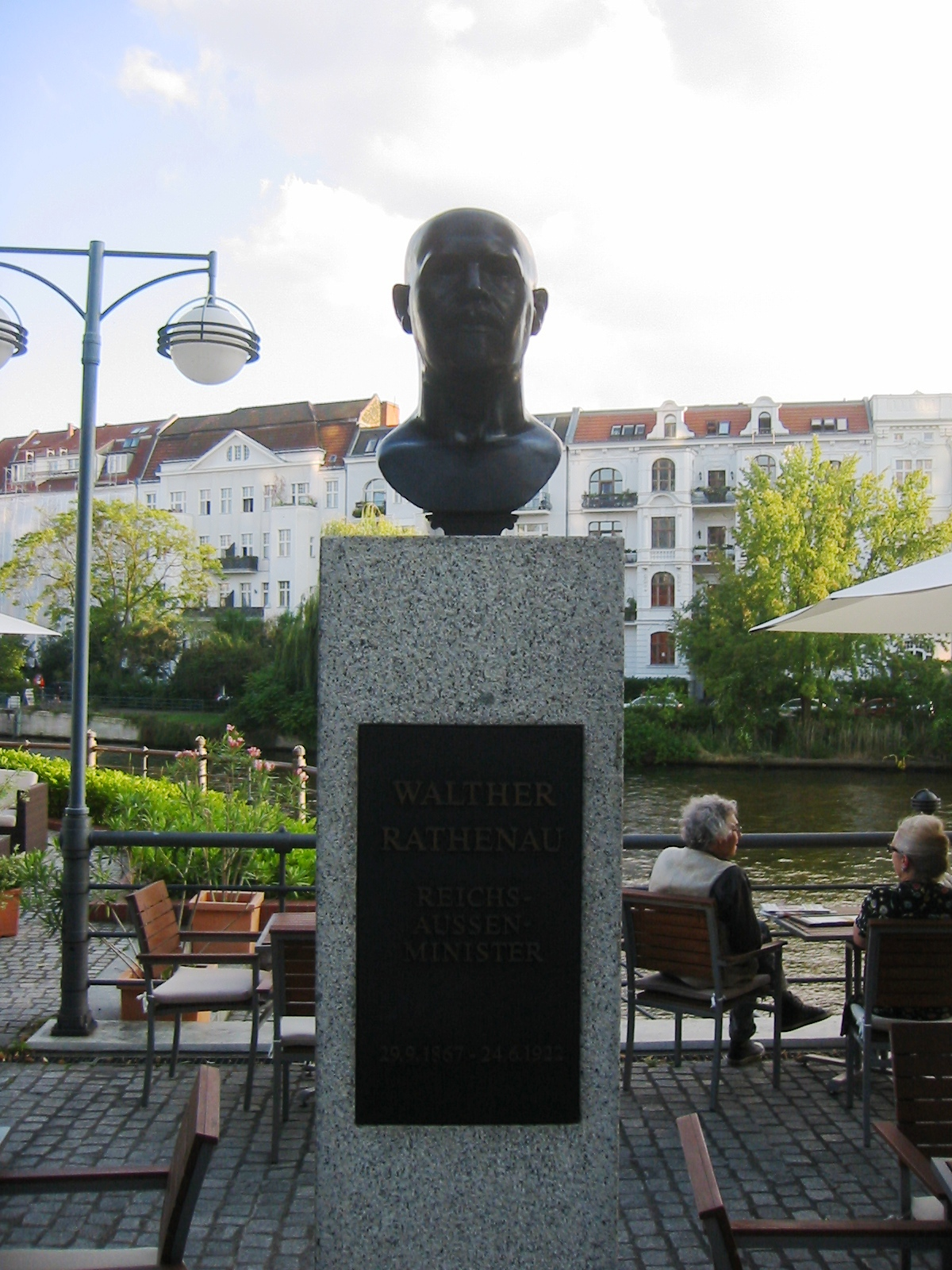 Büste für Walther Rathenau in der "Straße der Erinnerung", einem öffentlich zugänglichen Denkmal im Spreebogen im Berliner Ortsteil Moabit. Mit den Skulpturen ehrt die Ernst Freiberger-Stiftung Persönlichkeiten, die vorrangig in der ersten Hälfte des 20. Jahrhunderts "außergewöhnliches geleistet und in schwierigsten Zeiten vorbildliche Haltung bewiesen haben“.